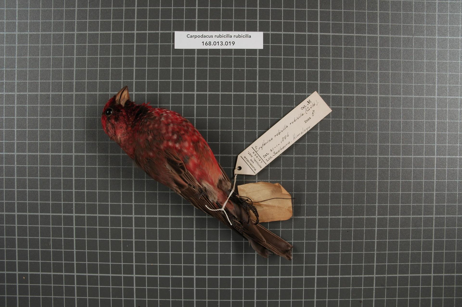 Carpodacus rubicilla rubicilla (Guldenstädt, 1775)